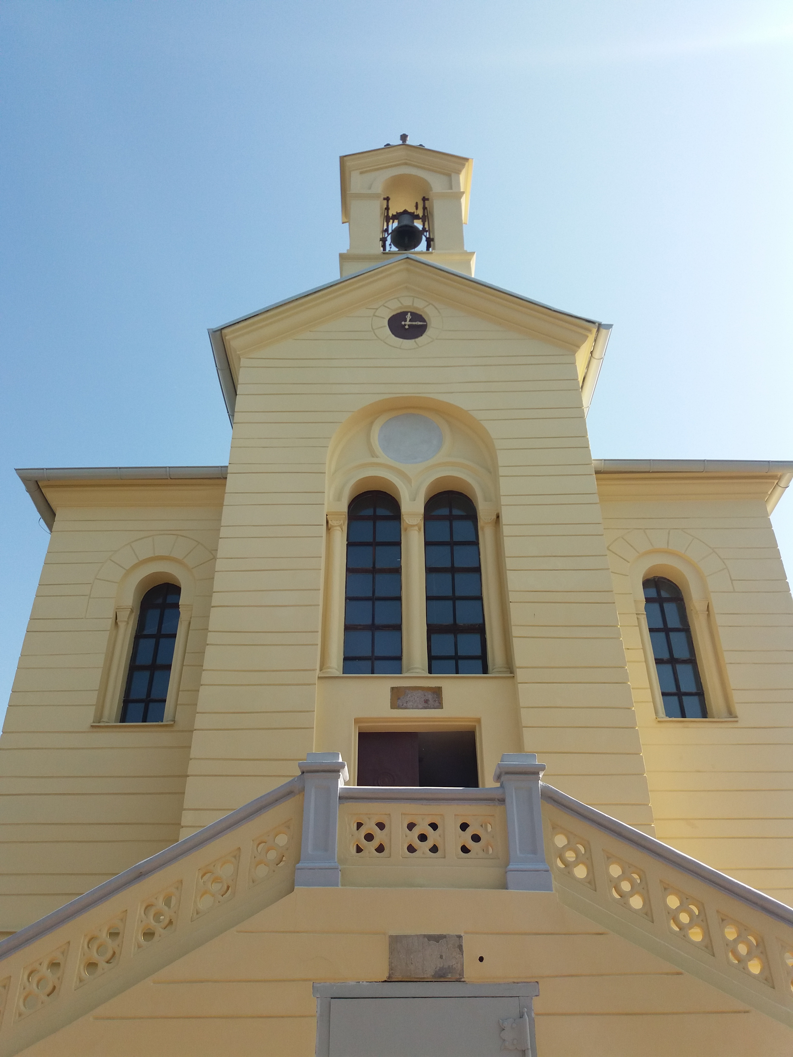 Srpski (latinica): Crkva Svetog Dimitrija, Zemun